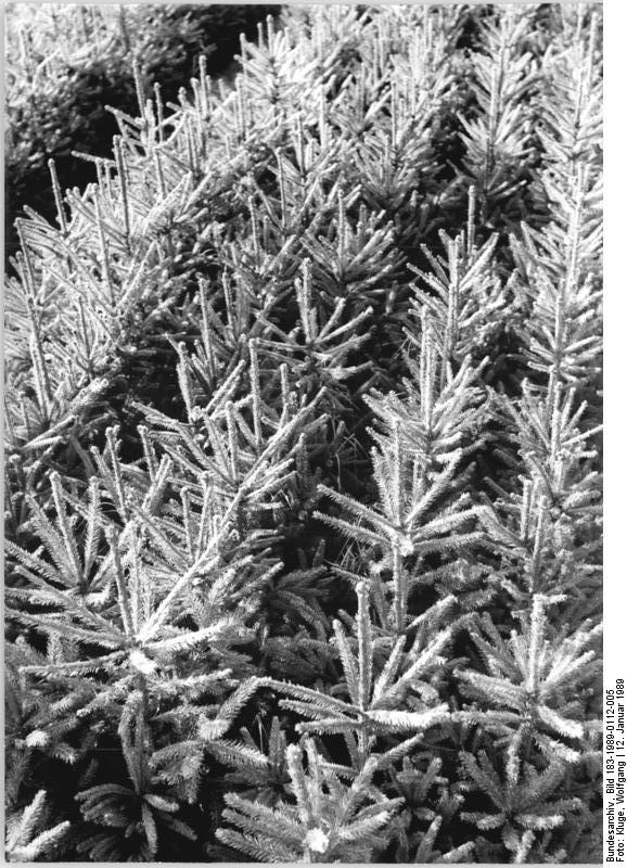 Falkenhain, Baumschule, Fichten ADN-ZB Kluge 12.1.1989 Bez. Leipzig: Gesunder Nachwuchs reift in der "Kinderstube des Waldes", der einzigen Forstbaumschule des Bezirkes Leipzig in Falkenhain heran. Dieser Fichtenbestand ist vier Jahre alt. Aus der 38 Hektar großen Baumschule kommen alle Jungpflanzen für den waldärmsten Bezirk der DDR. - Siehe auch 1989-0112-4 N und 6 N.